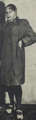 רינה נתן, הטרנסקסואלית הראשונה שהצליחה לעבור ניתוח לשינוי מין בישראל